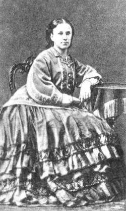 Елизавета Дмитриевна Безобразова (1834—1881) — русская писательница, супруга академика Владимира Павловича Безобразова.